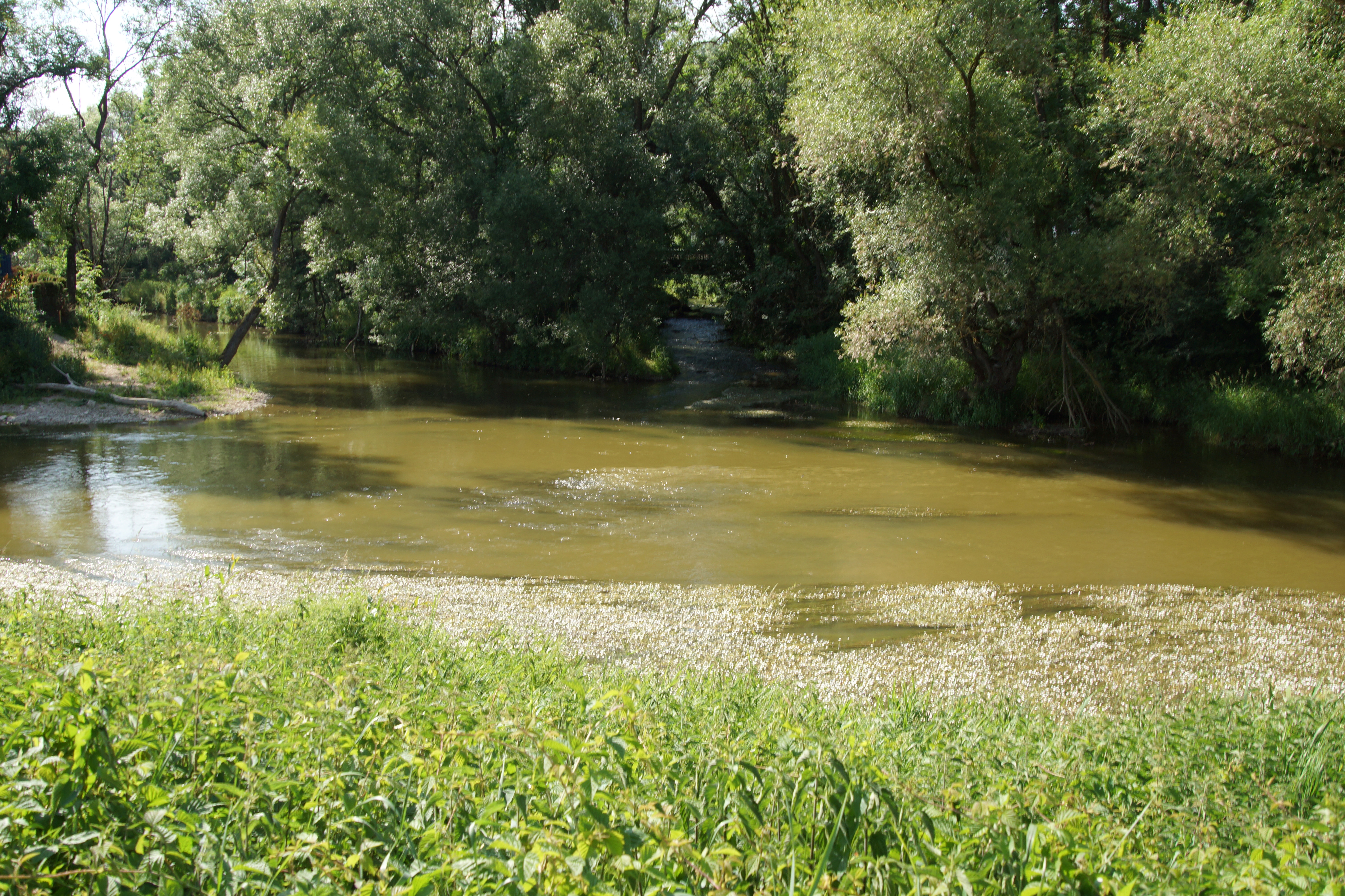 Die Altmühl bei Kinding: Die Einmündung der beiden Schwarzacharme